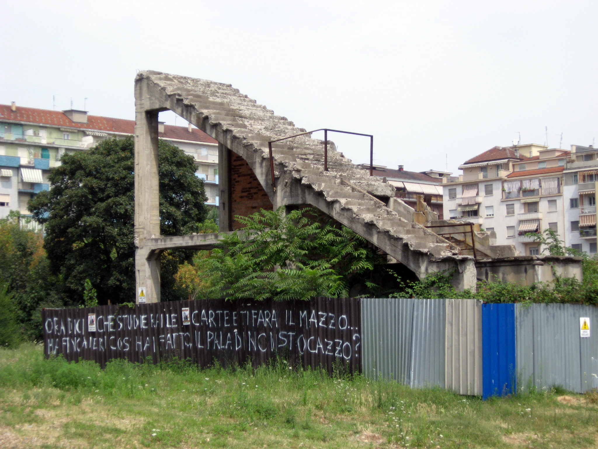 Old Filadelfia stadium in Turin